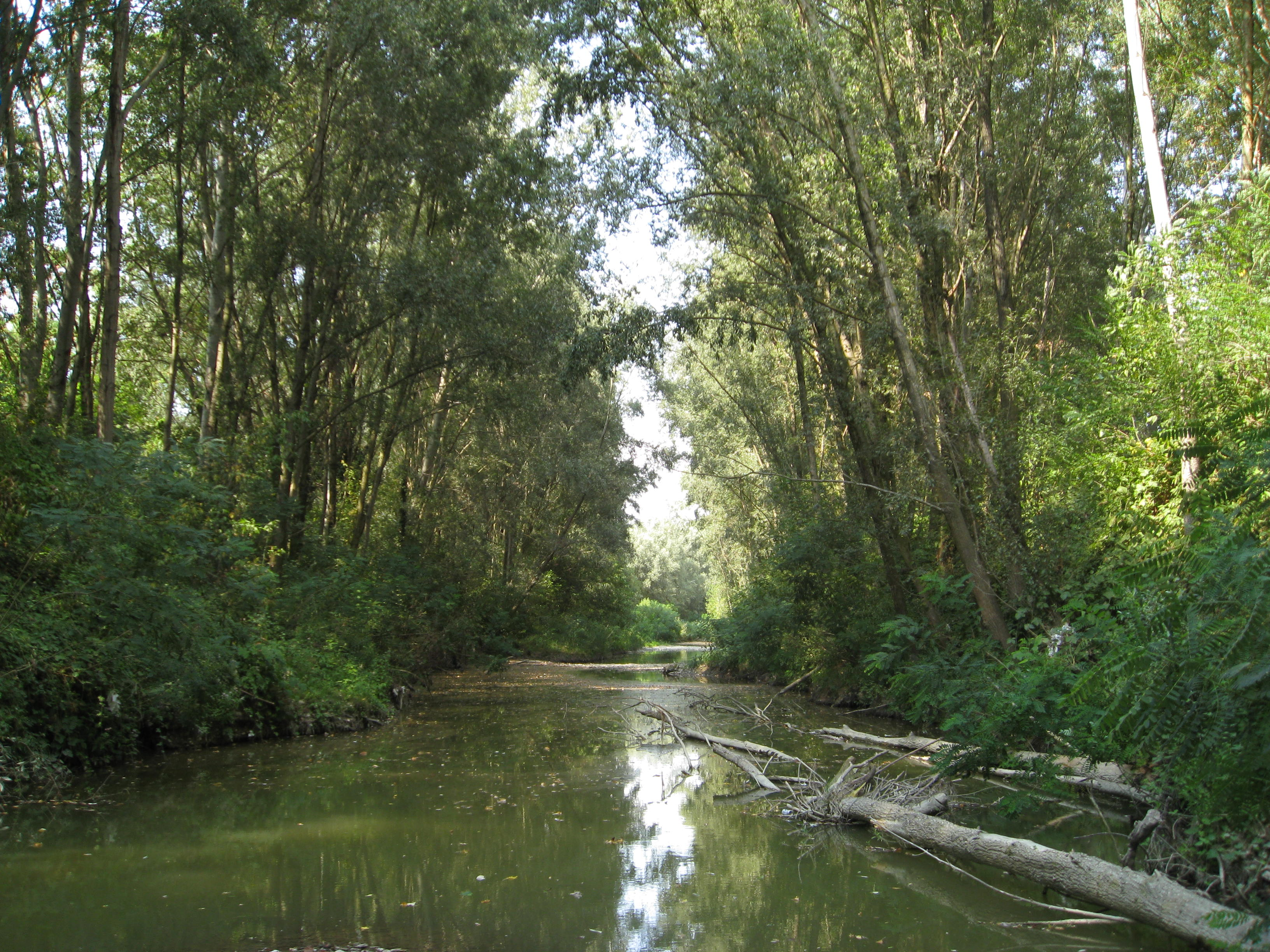 perkele